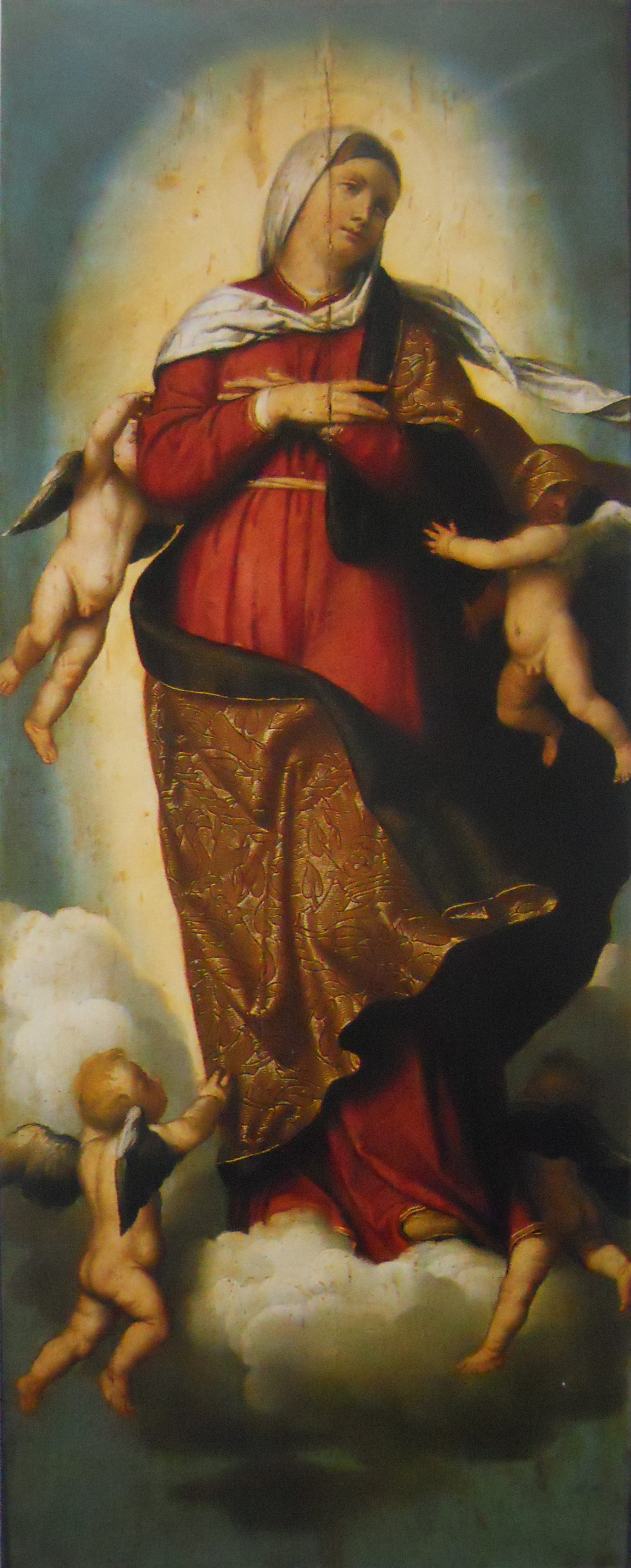 Assunzione di Maria (polittico Moretto)